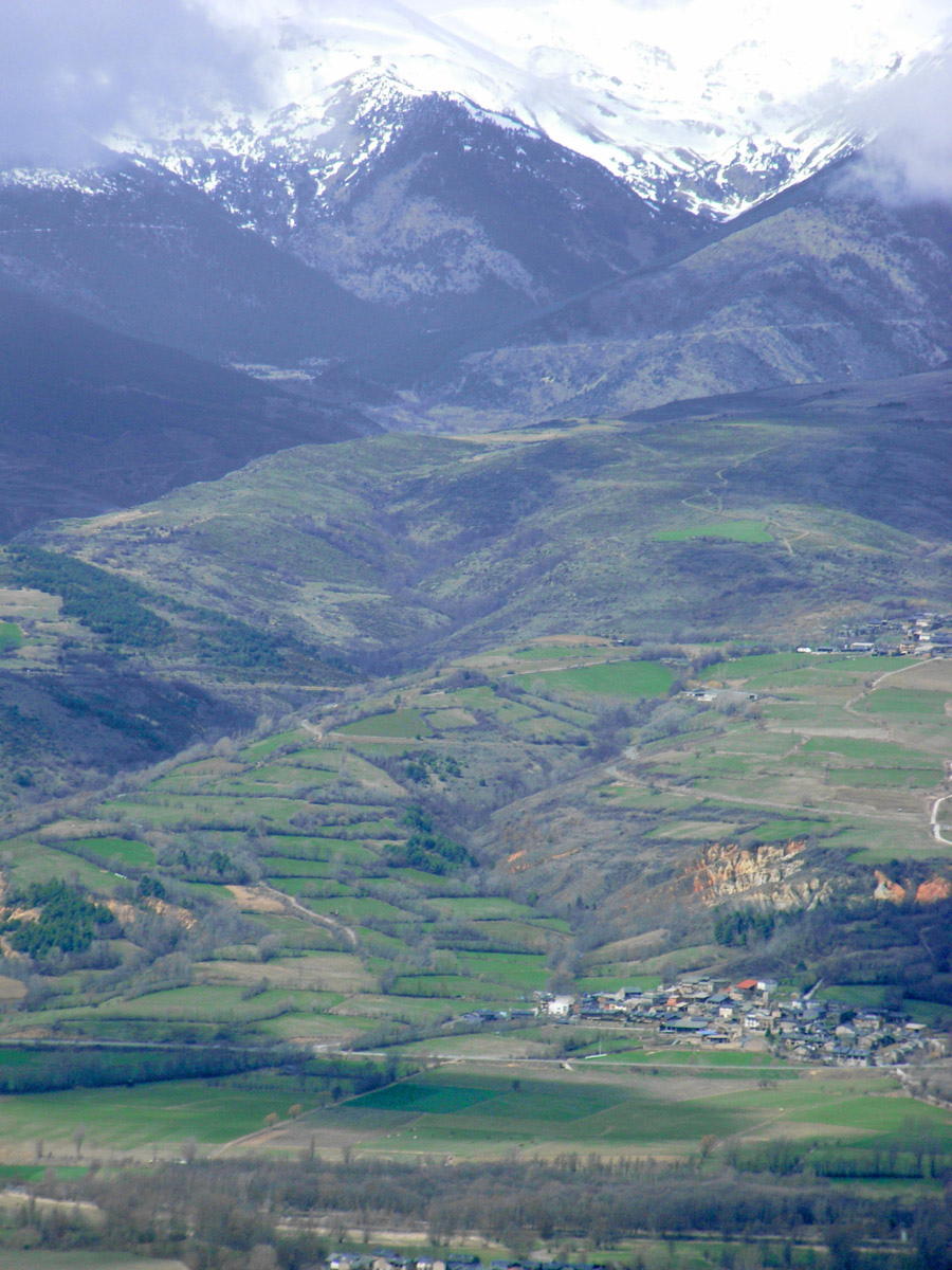 La Cerdanya des de Masella, amb el poble d'All, al fons la vall de Meranges i el circ d'Engorcs entre els núvols